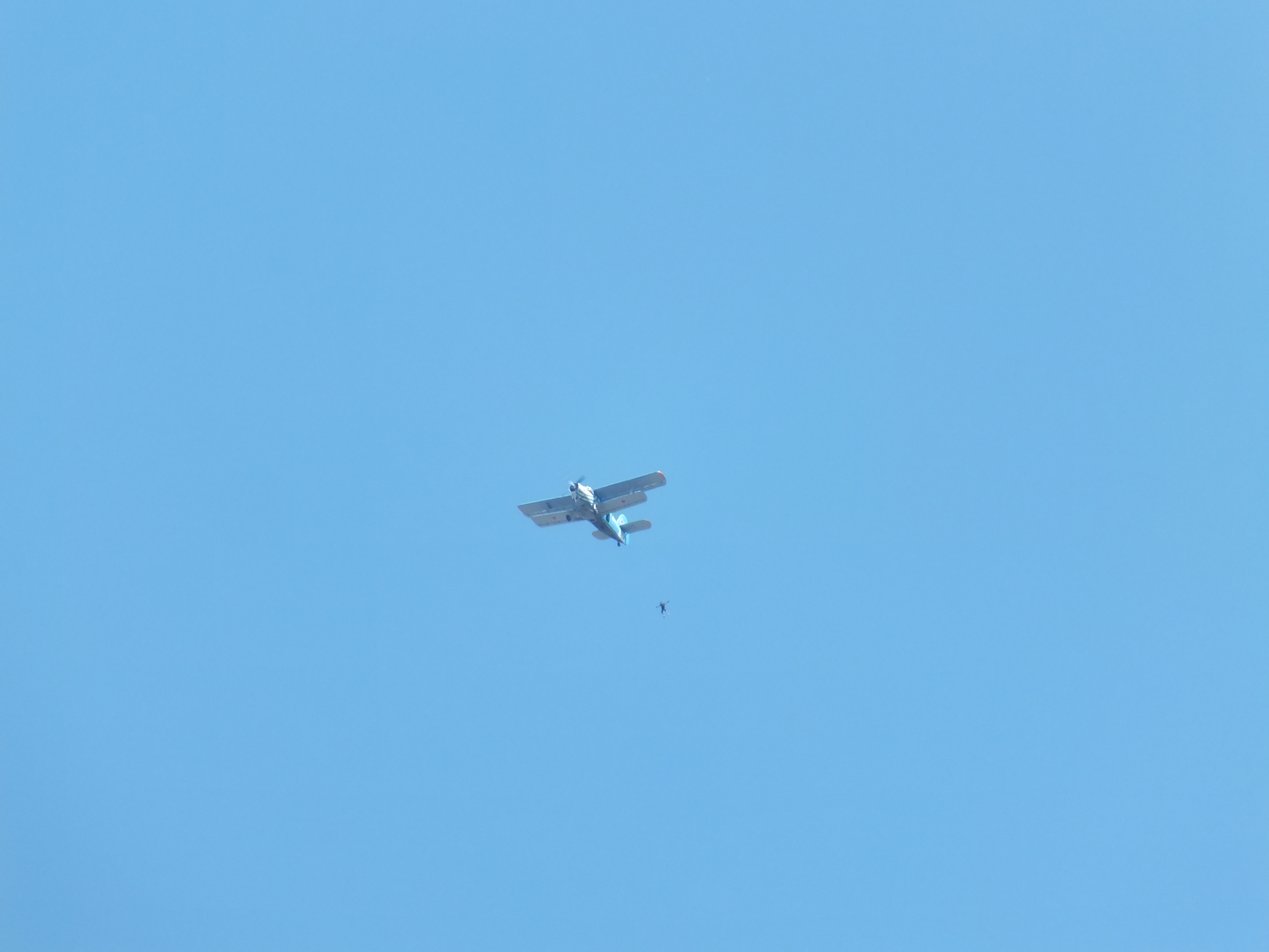 Antonov An-2